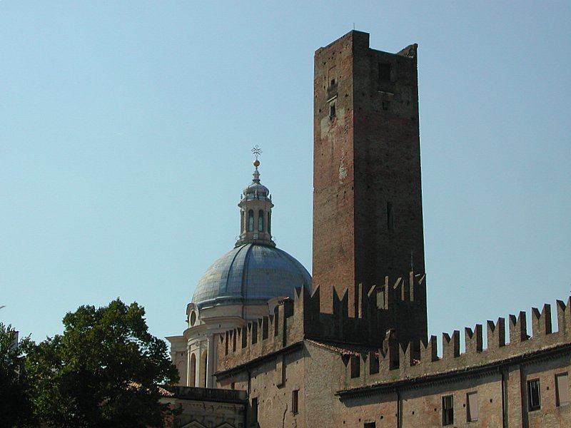 La Torre della Gabbia vor der Kuppel der Chiesa Sant'Andrea in Mantova Source: photo uploaded by User:RicciSpeziari. Photographer: Riccardo Speziari